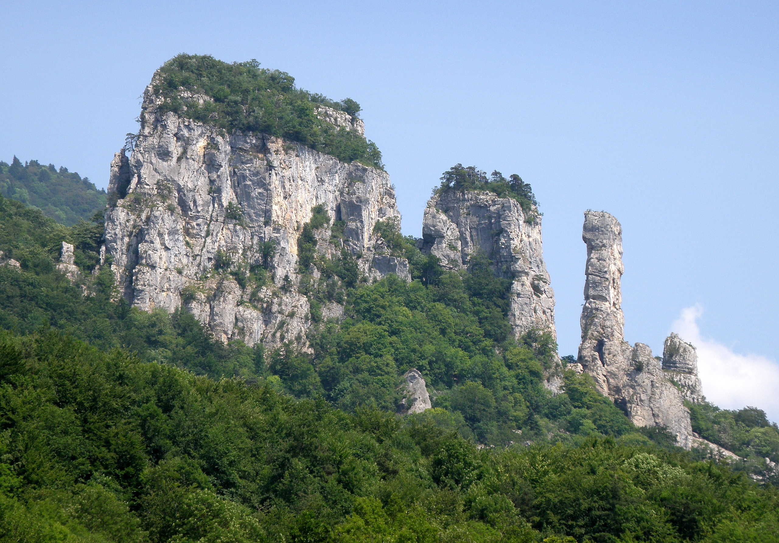 Allèves, commune du département de la Haute-Savoie (région Rhône-Alpes, France). Les Tours Saint-Jacques, vues depuis le pont de l'Abîme.